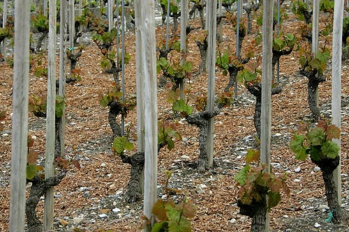 Es wächst der Walliser Fendant (Weisswein)